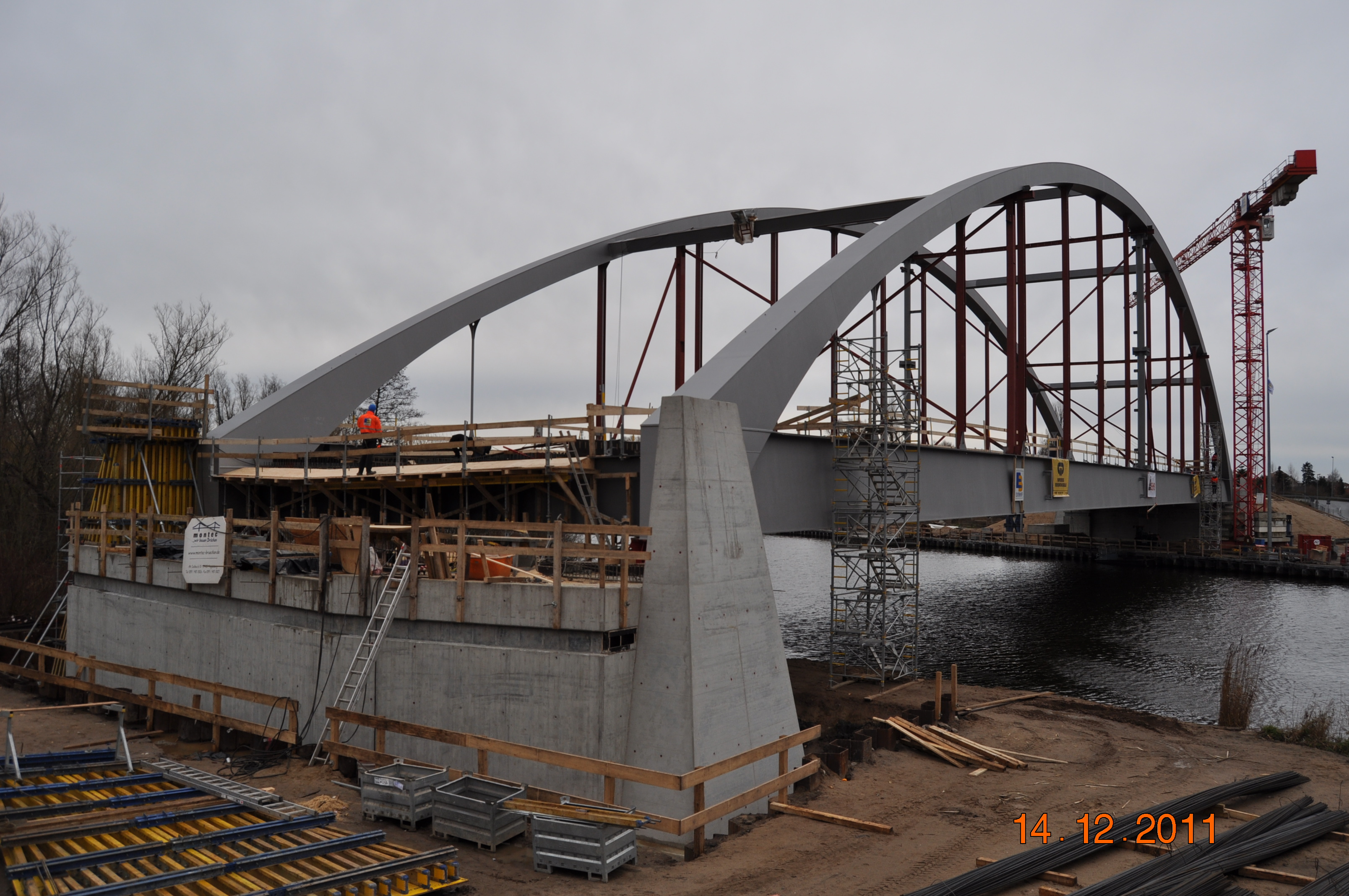 Peenebrücke Jarmen - Neue Brücke auf den Widerlagern